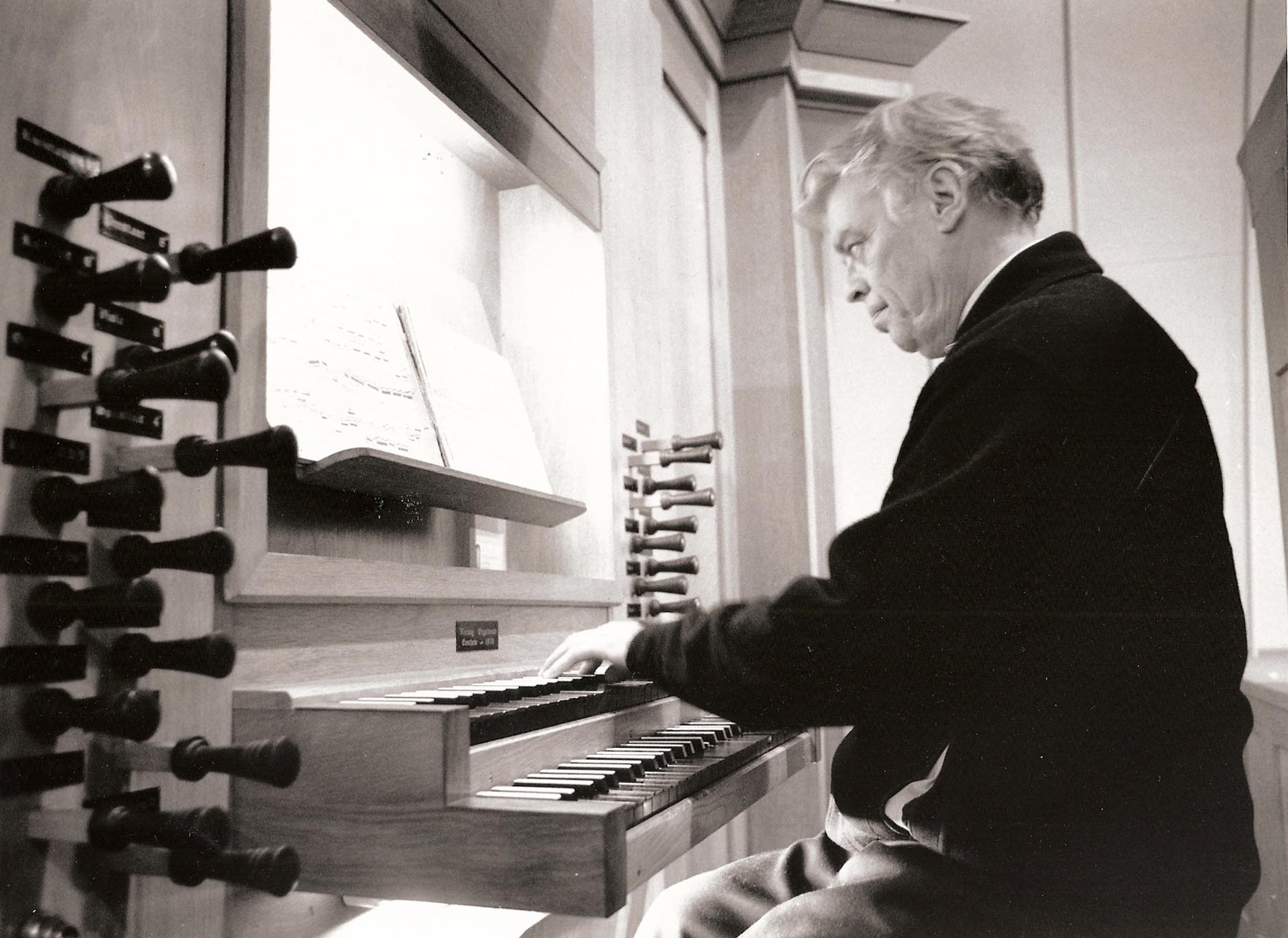 Nederlands organist en dirigent Charles de Wolff